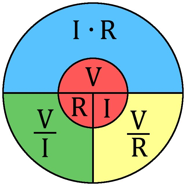 Recordatorio "circular" de la Ley de Ohm